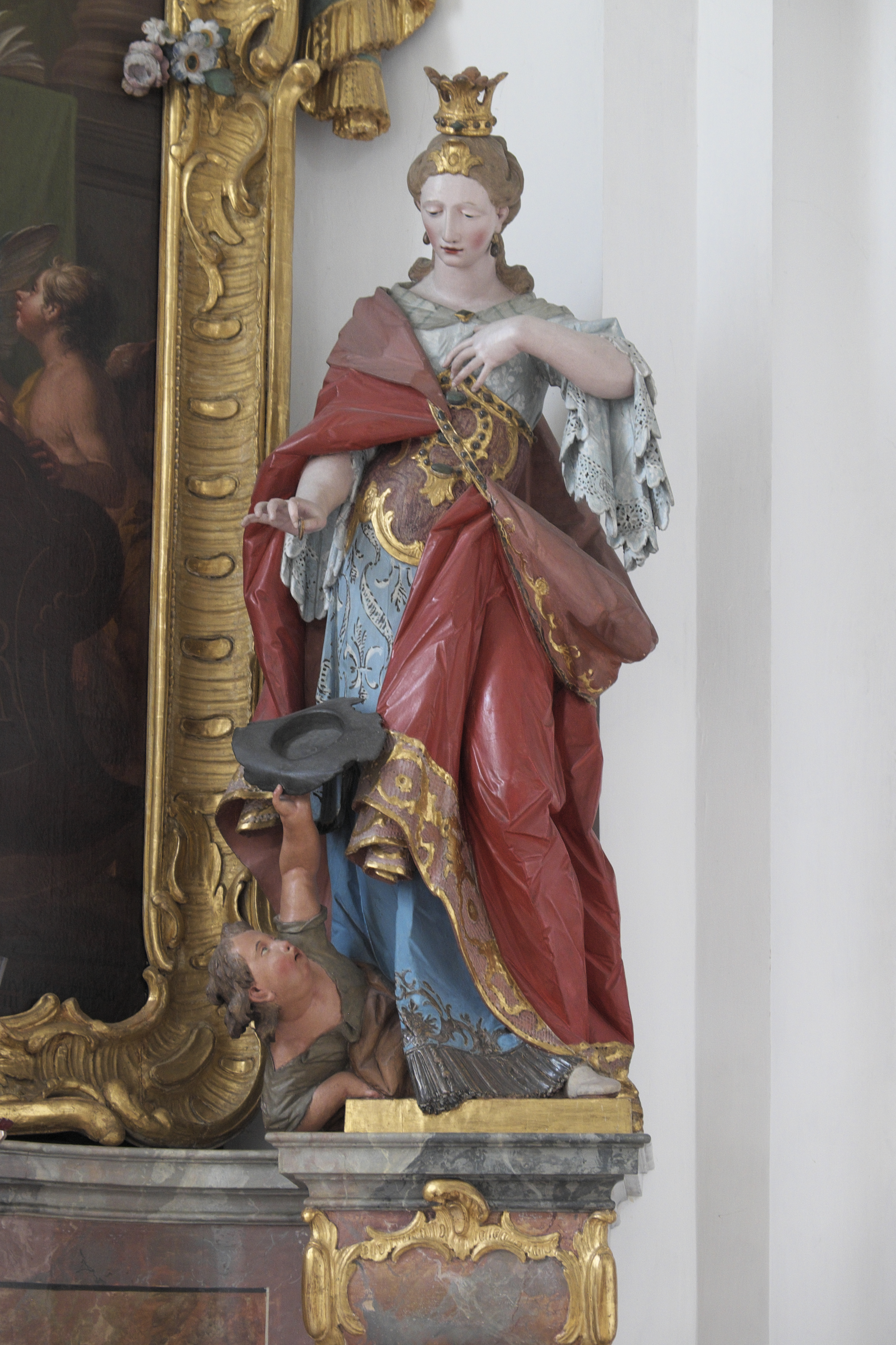 Katholische Pfarrkirche St. Marinus und Anianus, ehemalige Abteikirche des Benediktinerklosters Rott in Rott am Inn im Landkreis Rosenheim (Bayern/Deutschland), Statue der Hl. Elisabeth von Thüringen am Diagonalaltar im Nordosten, rechts, 1763-66 von Joseph Götsch